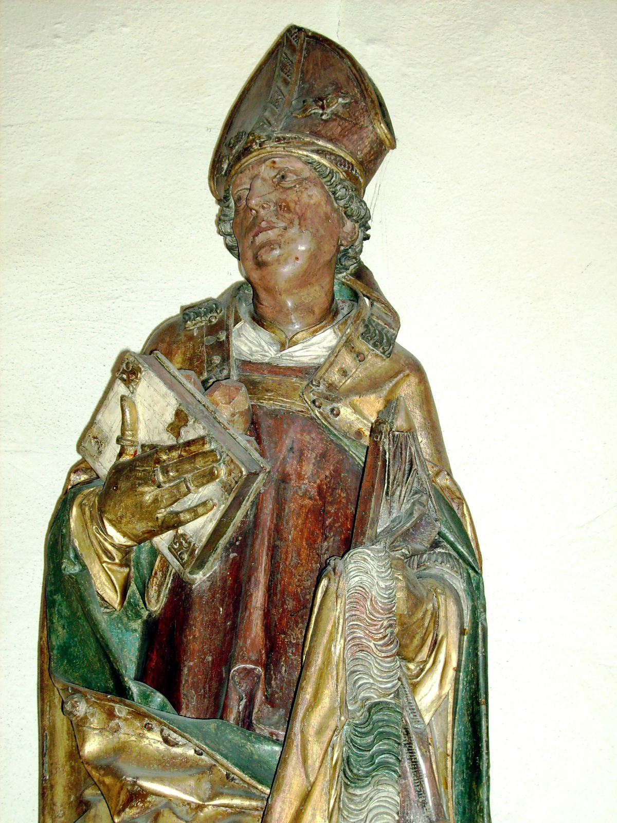 Ochsenfurt, Stadtpfarrkirche. St. Nikolaus von Tilman Riemenschneider, Lindenholz um 1500.